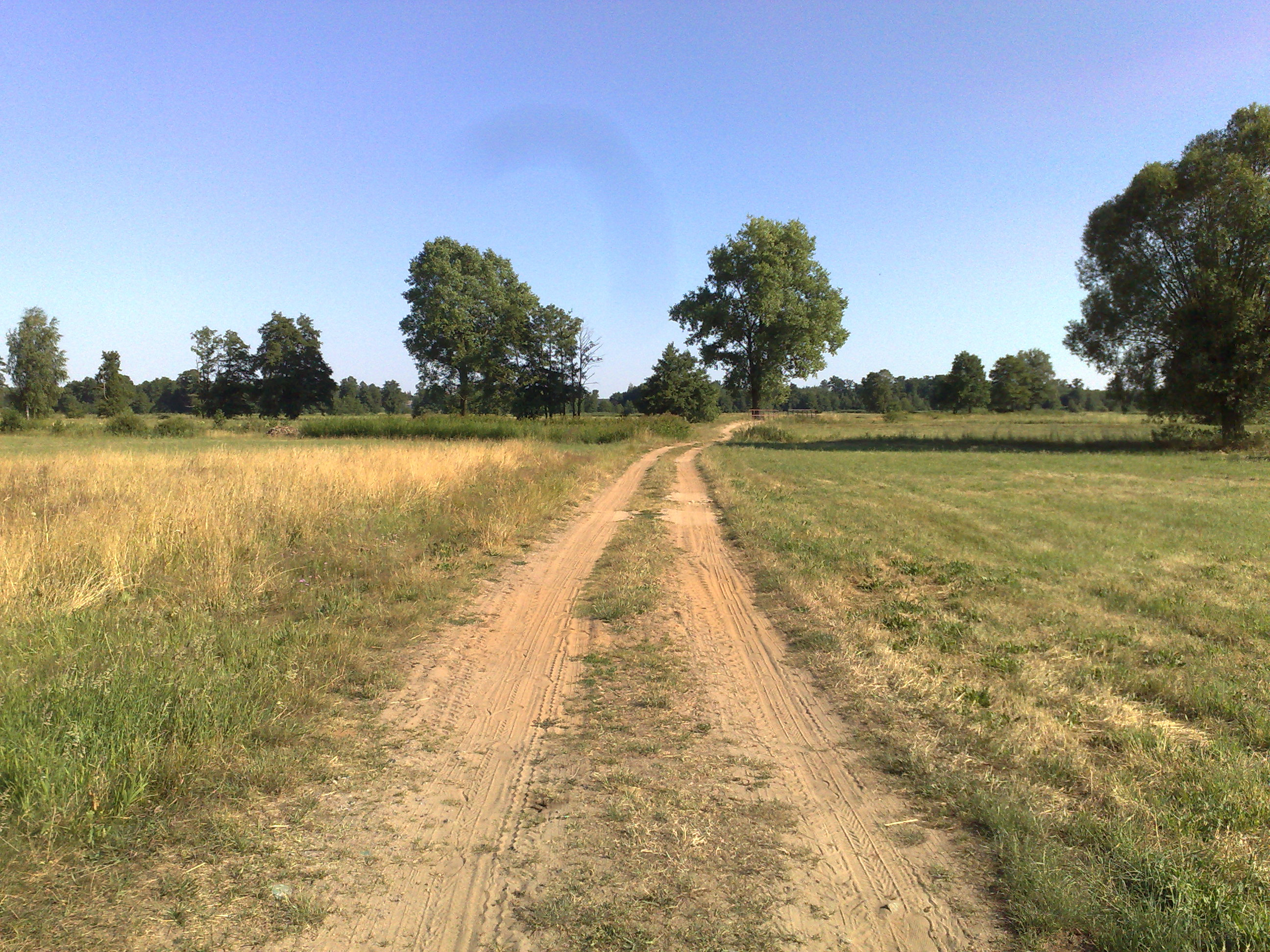 Wieś Cierpaitka